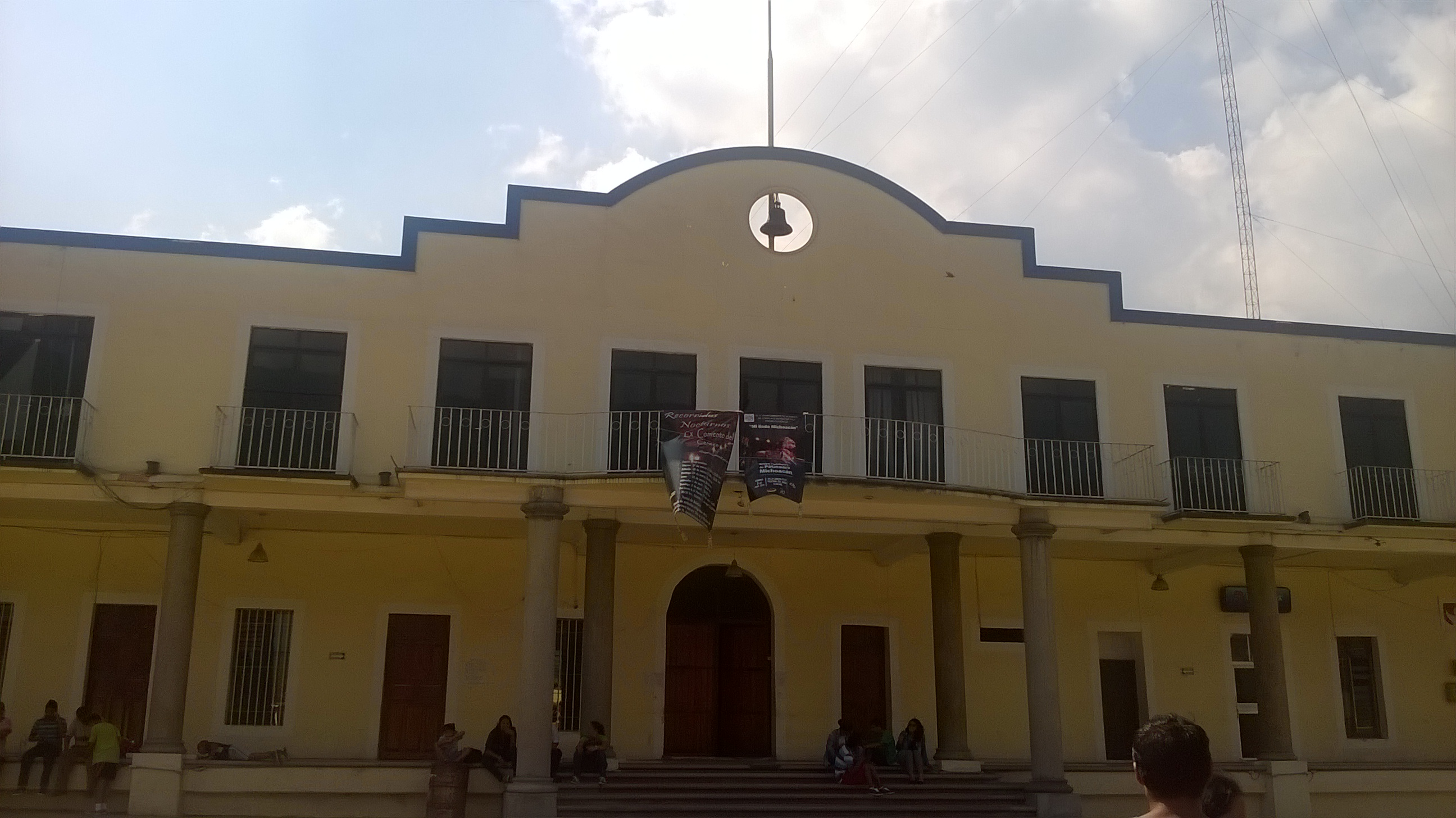 Presidencia Municipal de Nogales, Veracruz